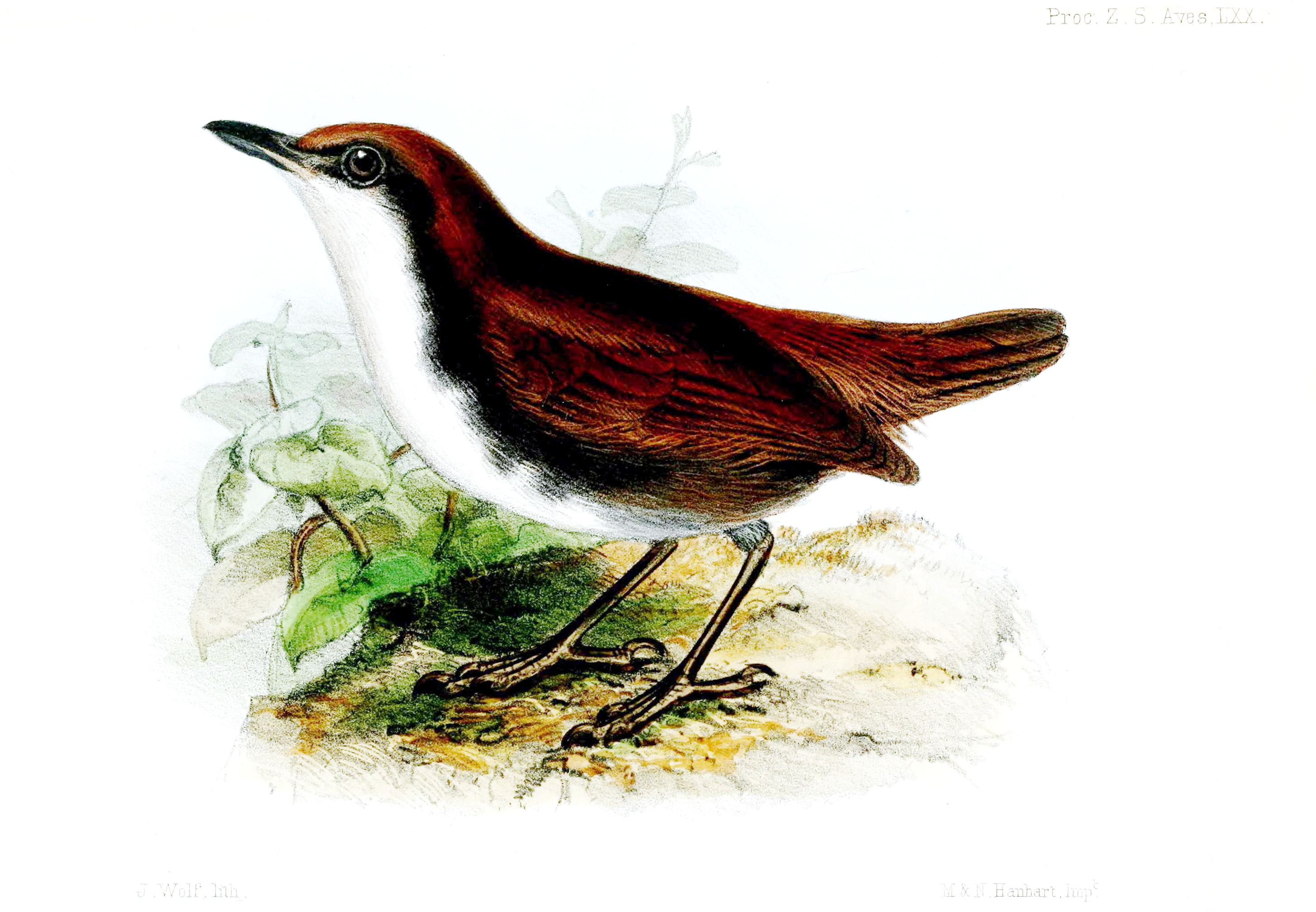 Myrmeciza leucaspis = Gymnopithys leucaspis